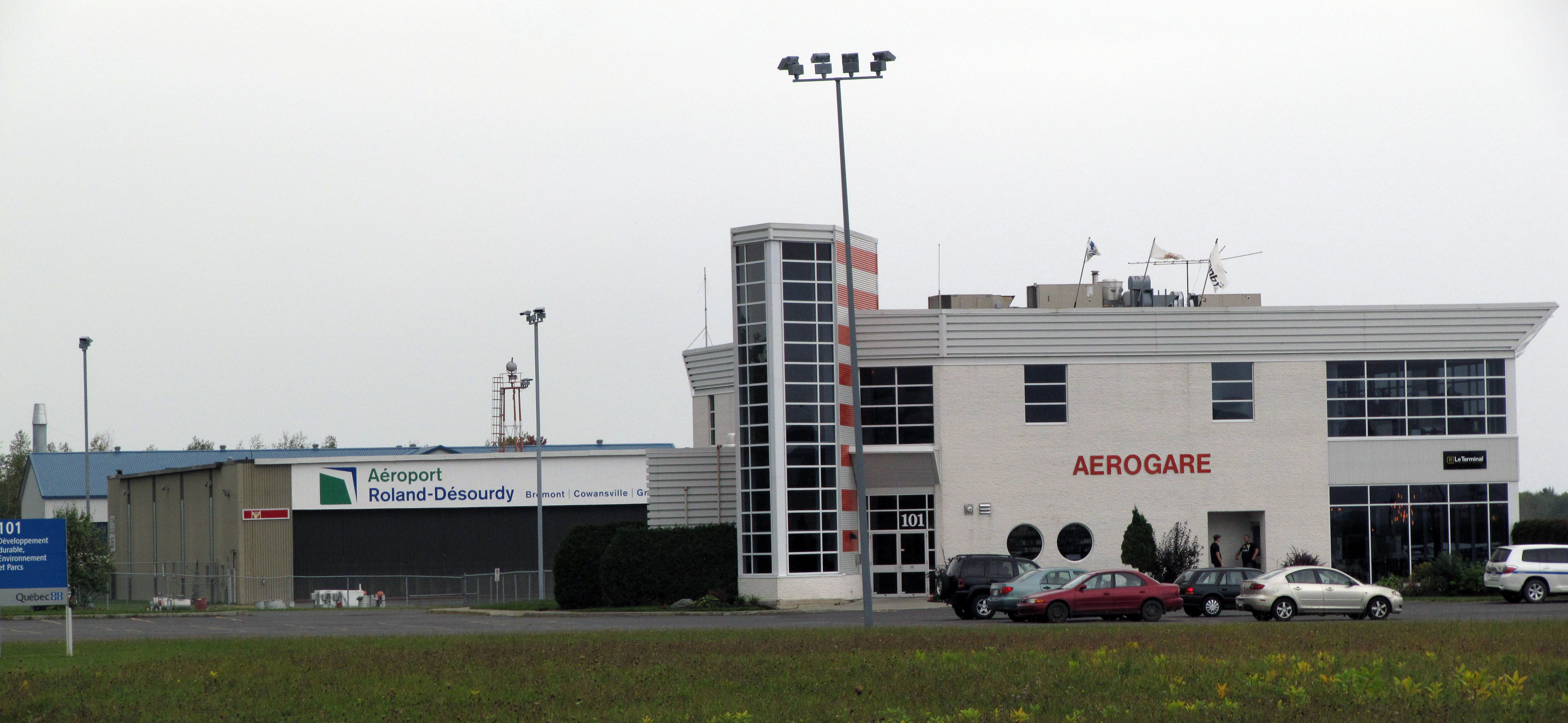 Aéroport régional Roland-Désourdy à Bromont, Québec (anciennement aéroport régional des Cantons-de-l'Est)